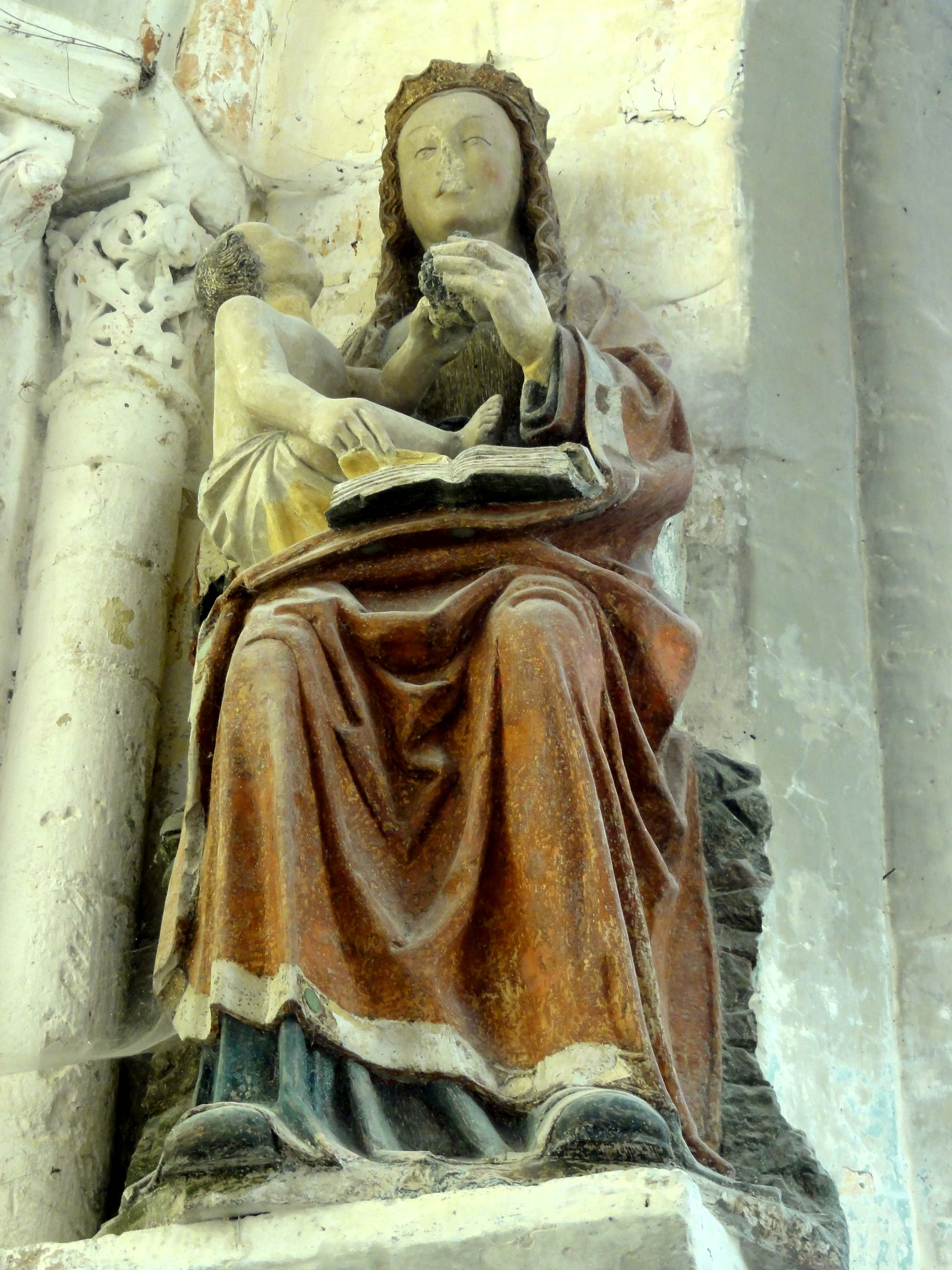 Vierge à l'Enfant assise.